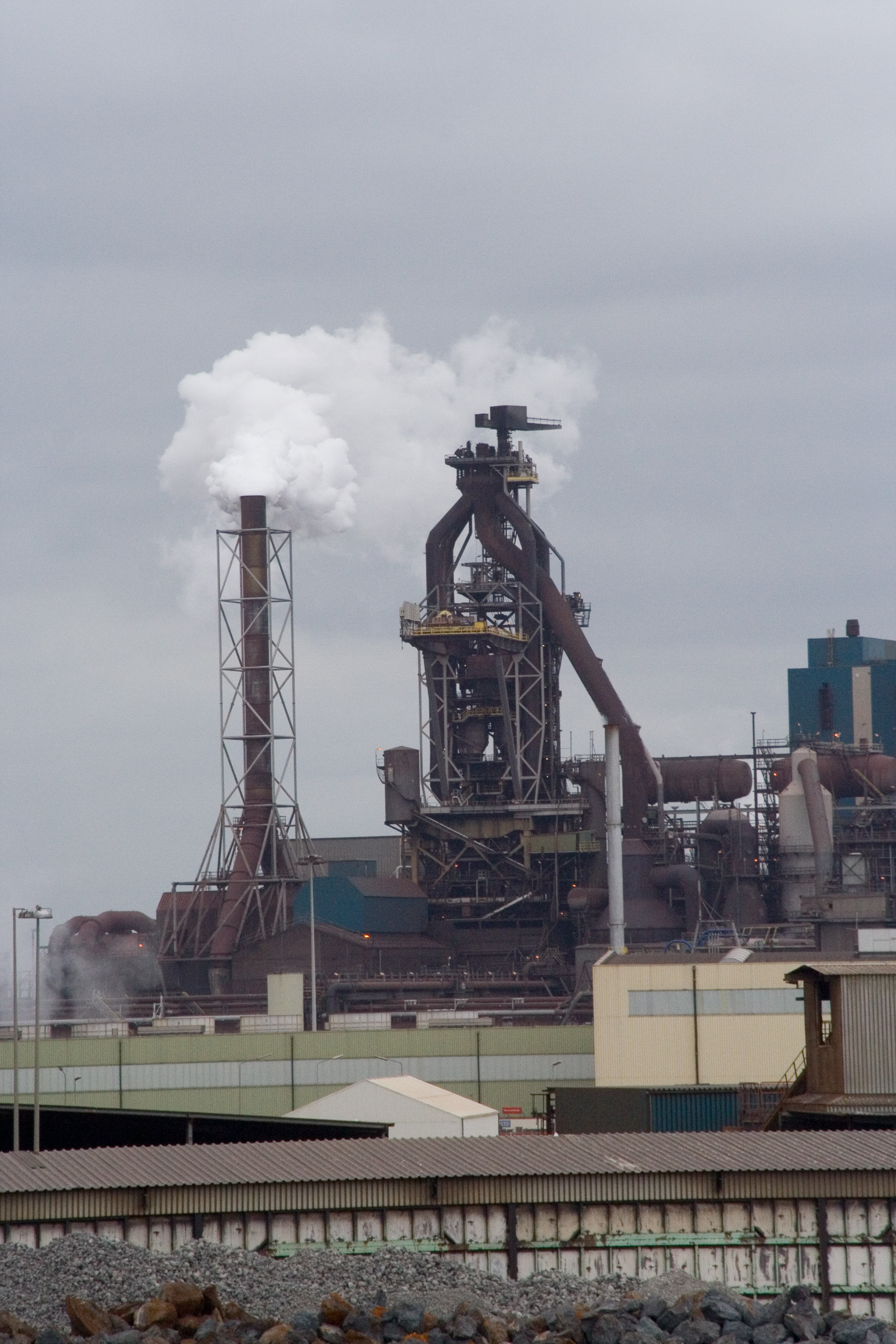 Blast furnace at Corus IJmuiden as seen from Wijk aan Zee.